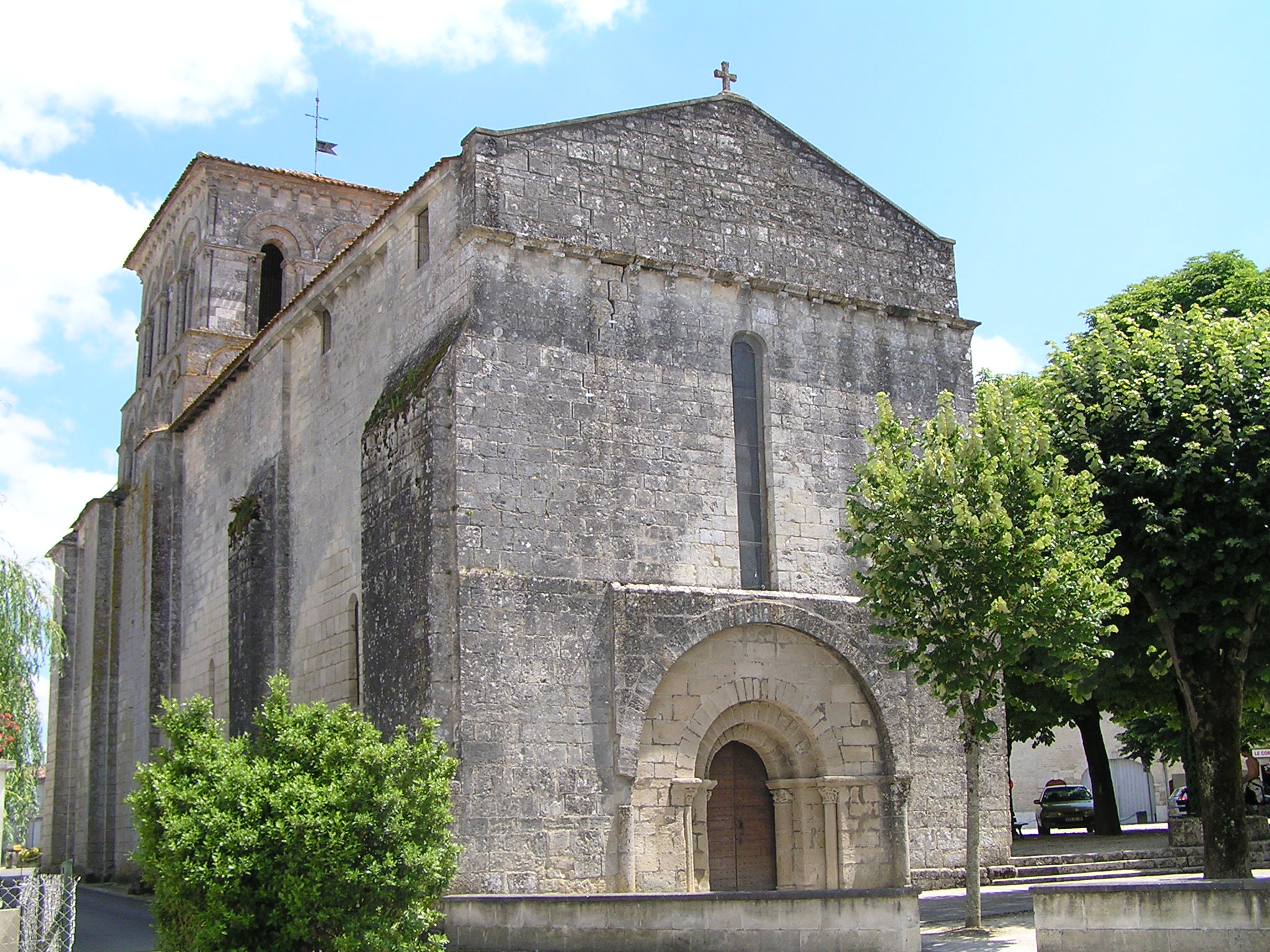 église de Sigogne, Charente, France